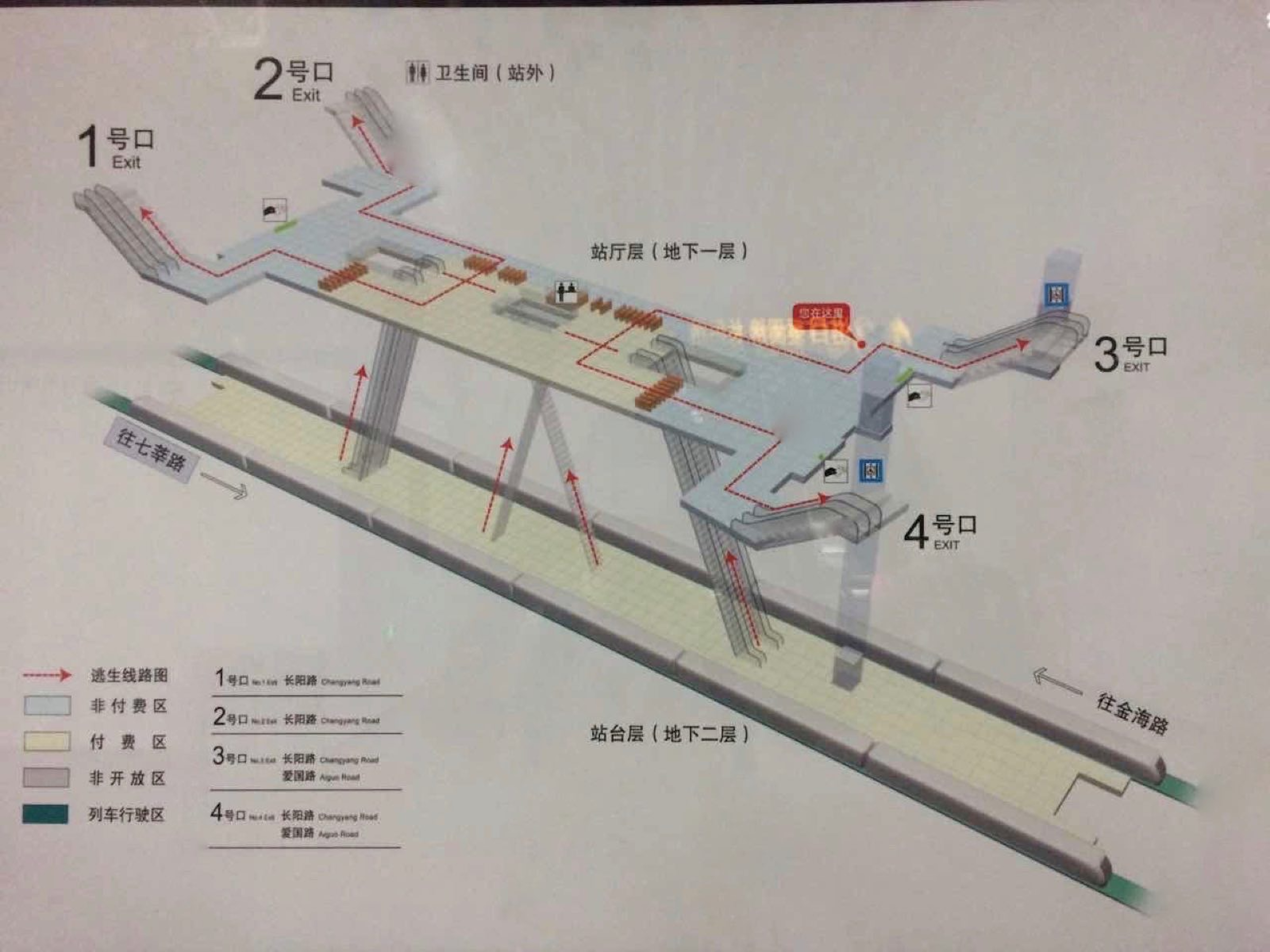 愛国路駅構造情報案内。2017年8月2日撮影。